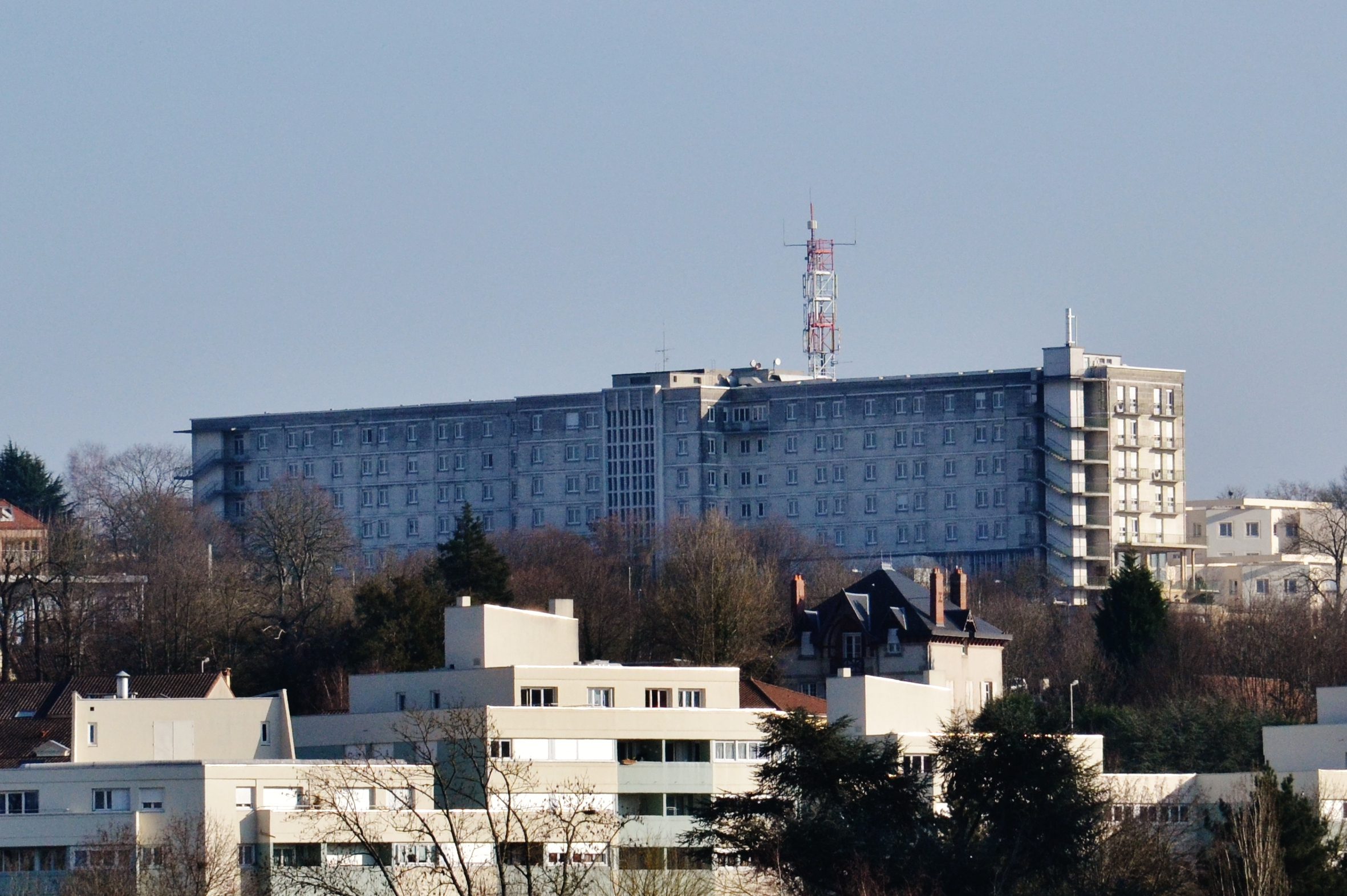 L'EHPAD du Dr Chastaingt, à Limoges (Haute-Vienne, France)